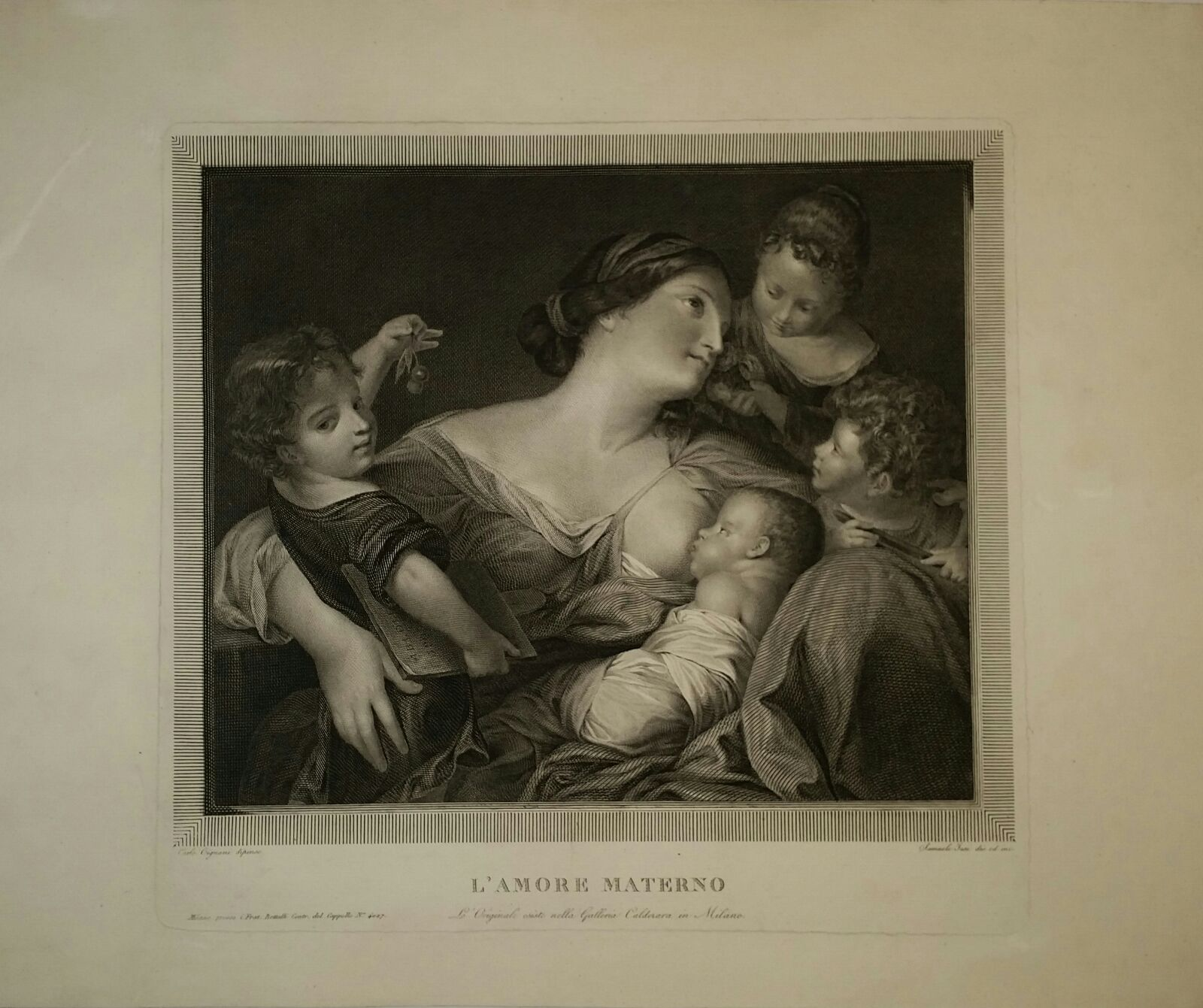 Titolo: "L'Amore Materno" Incisore: Samuele Jesi Autore del soggetto Carlo Cignani (1628-1719) Tecnica: acquaforte e bulino Anno: 1818